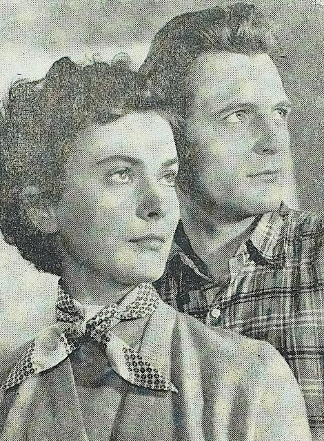 Metka Gabrijelčič in Franek Trefalt